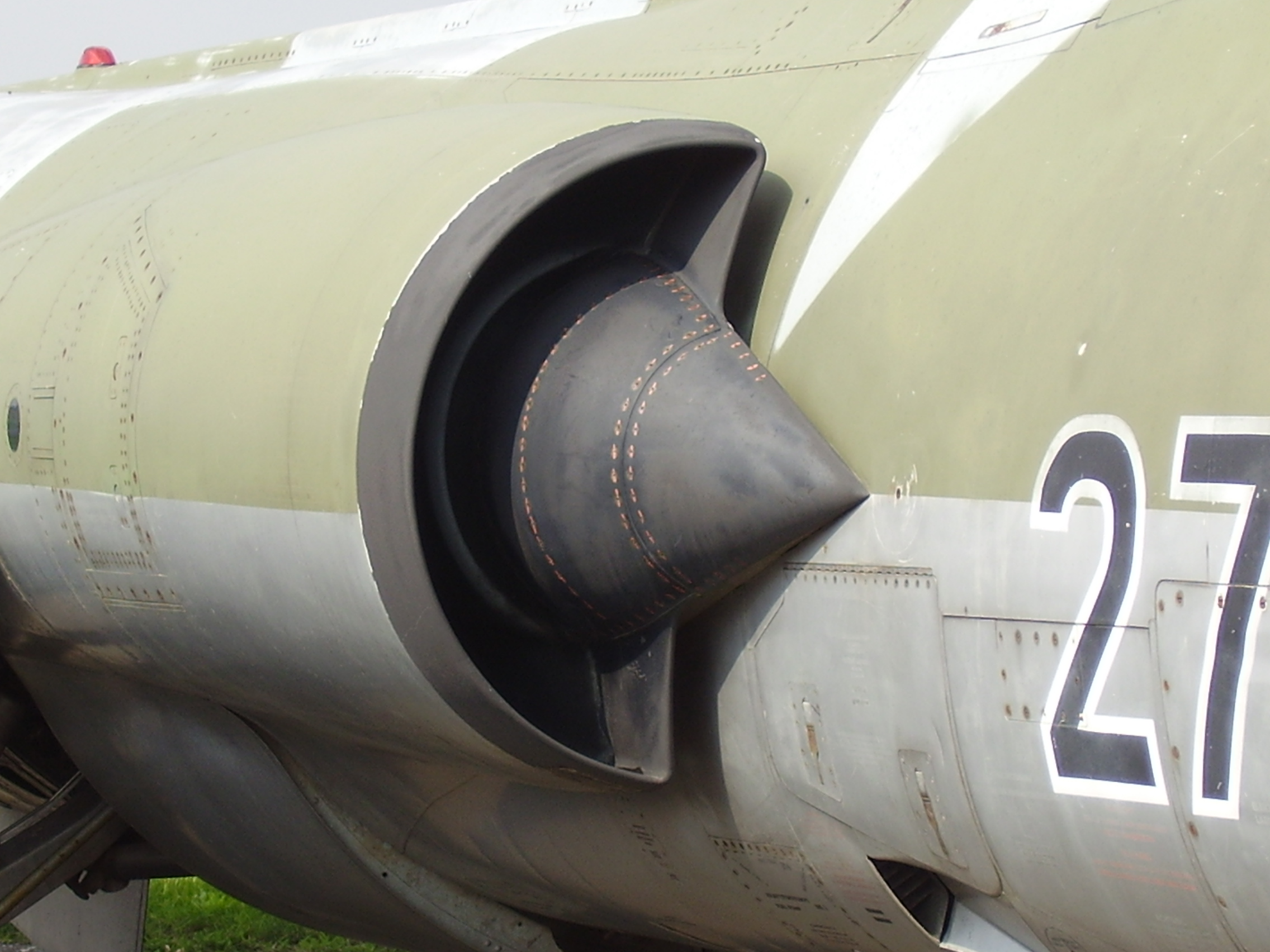 Luftwaffenmuseum der Bundeswehr; Airforce Museum of the Bundeswehr; Berlin-Gatow, Starfighter TF-104G